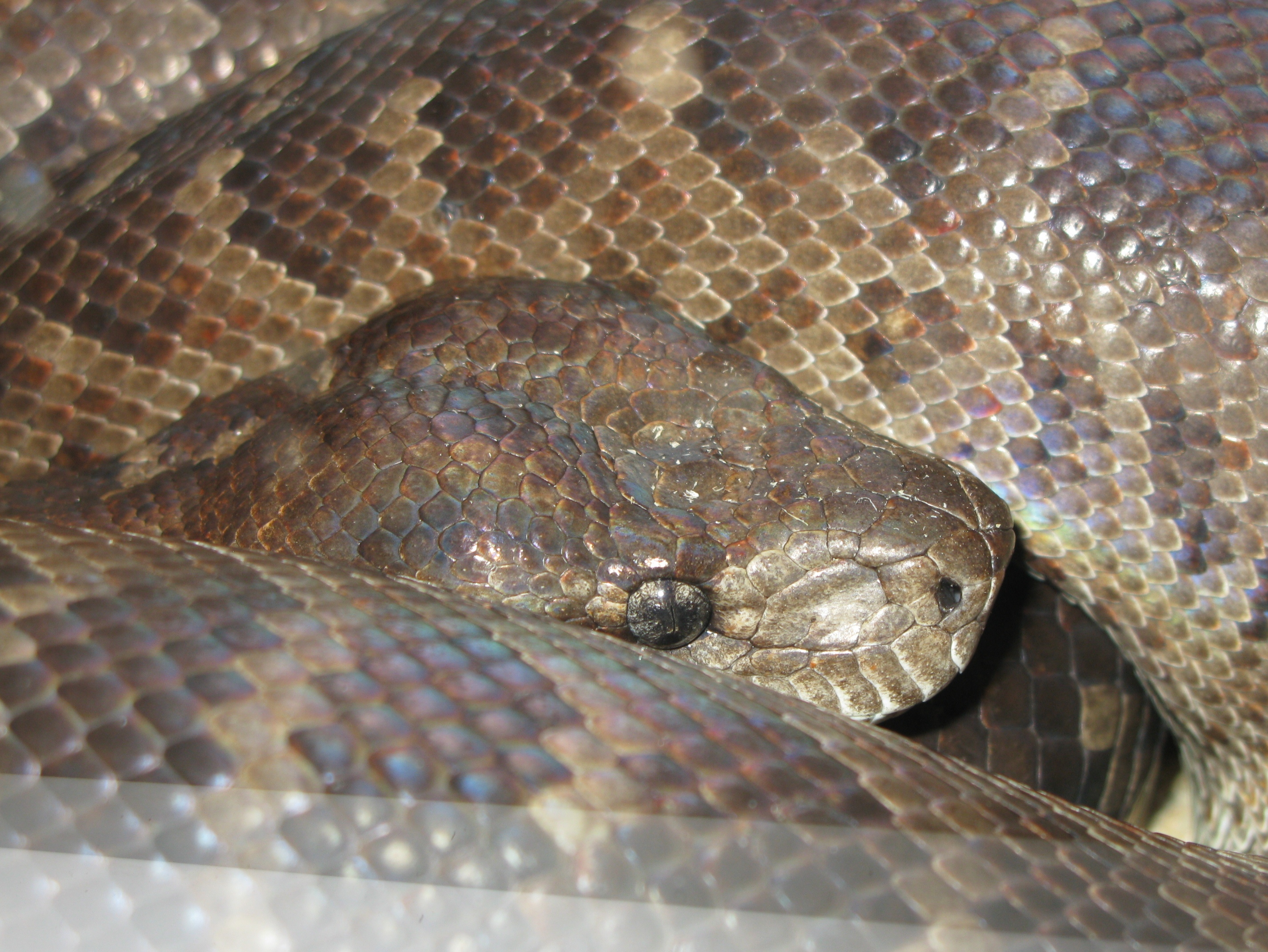 Стройный удав (Epicrates striatus) в зоопарке города Гродно, Беларусь.